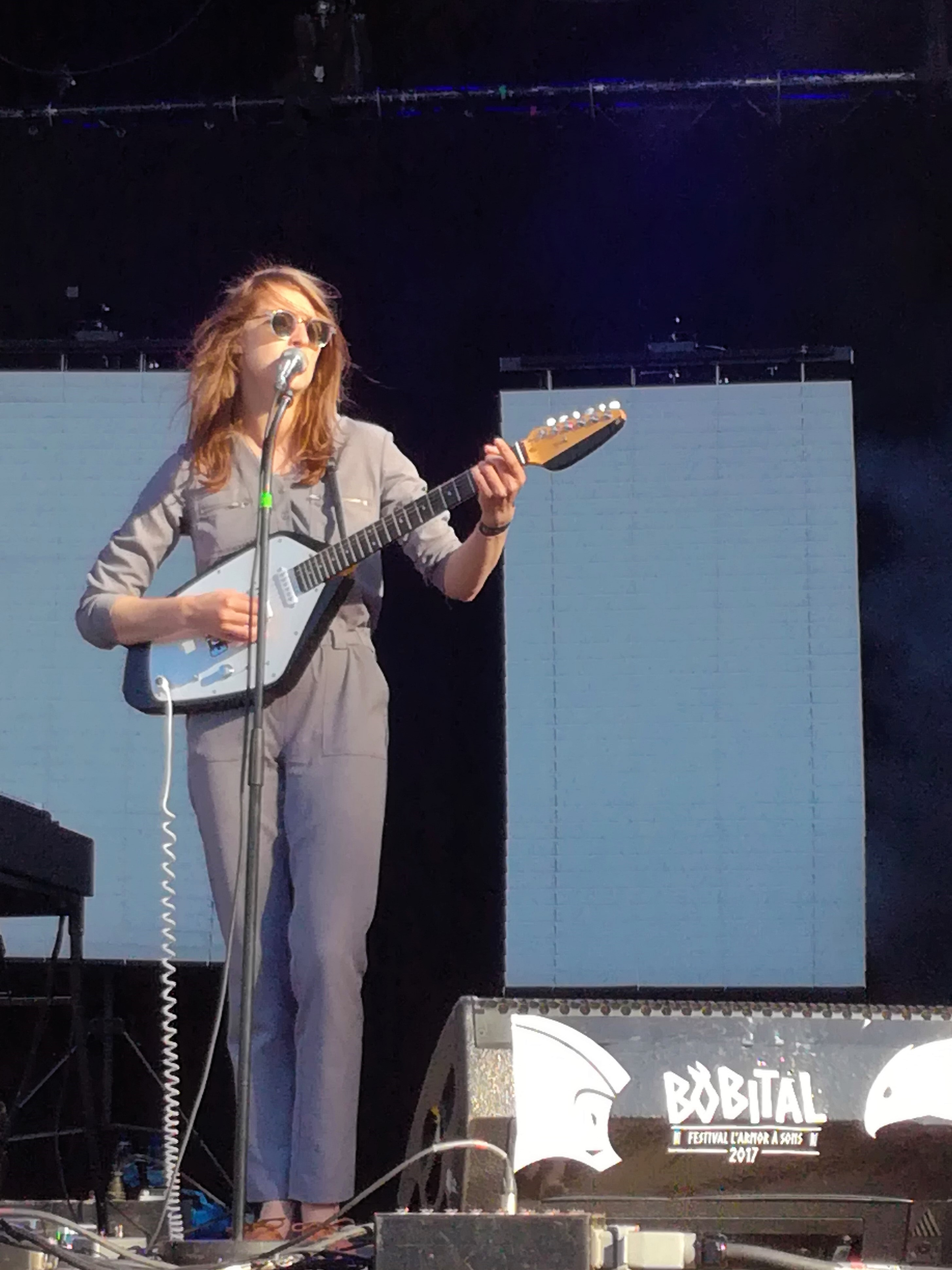 Fishbach en concert au Festival de Bobital le 1er juillet 2017.